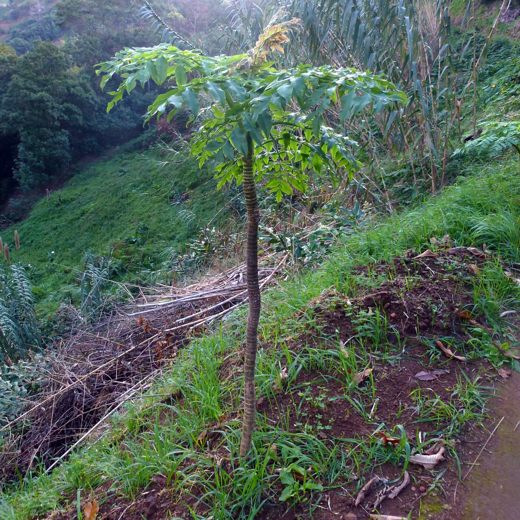 Levada Wanderungen, Madeira, Portugal